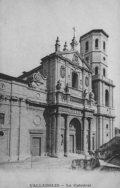 Catedral. Fachada - Valladolid - Colección Valladolid, postales para el Recuerdo, editada por el Diario El Mundo de Valladolid. Valladolid. La Catedral. - Fotografía. Papel 90 x 140 B/N